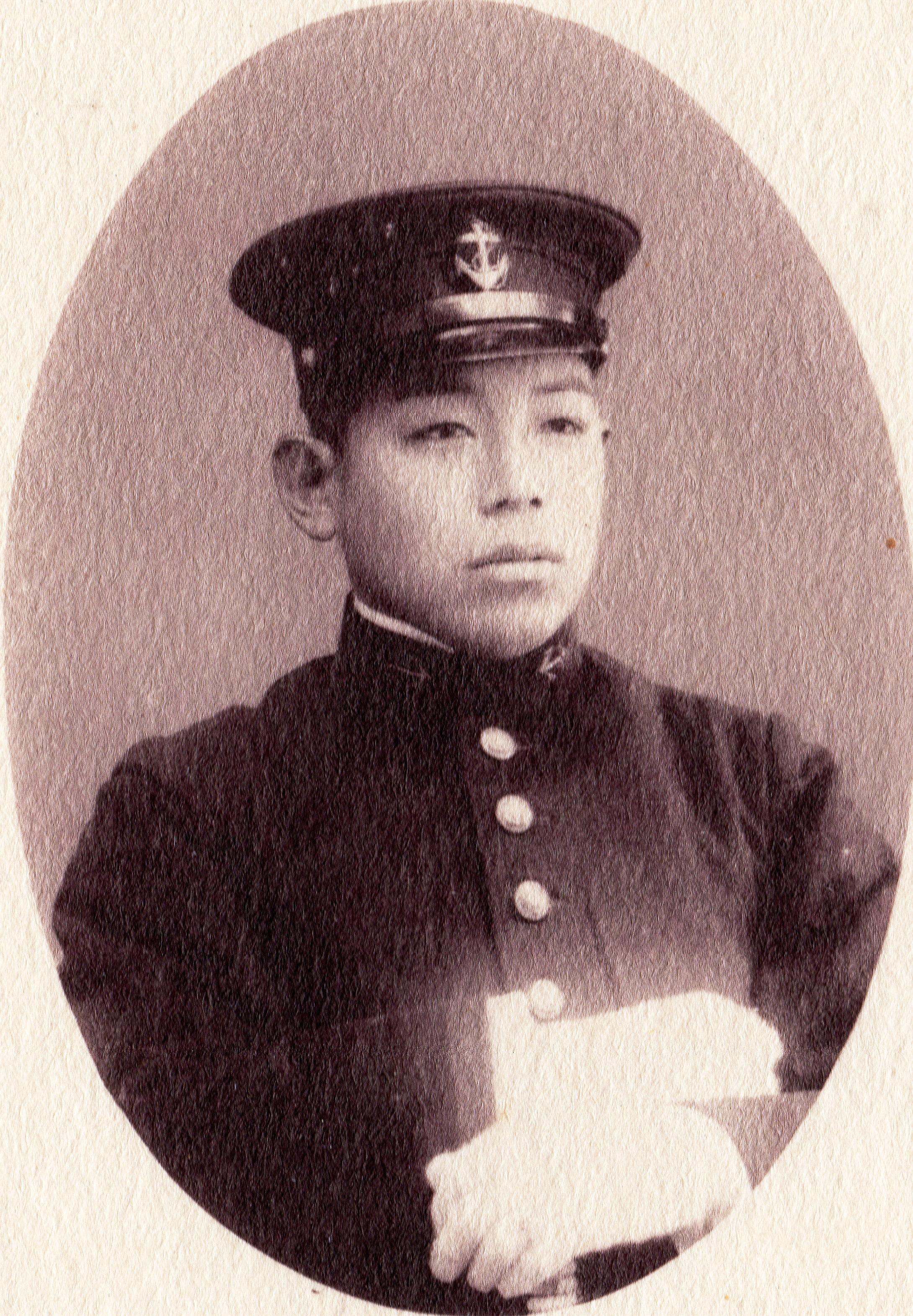 海兵生徒時代